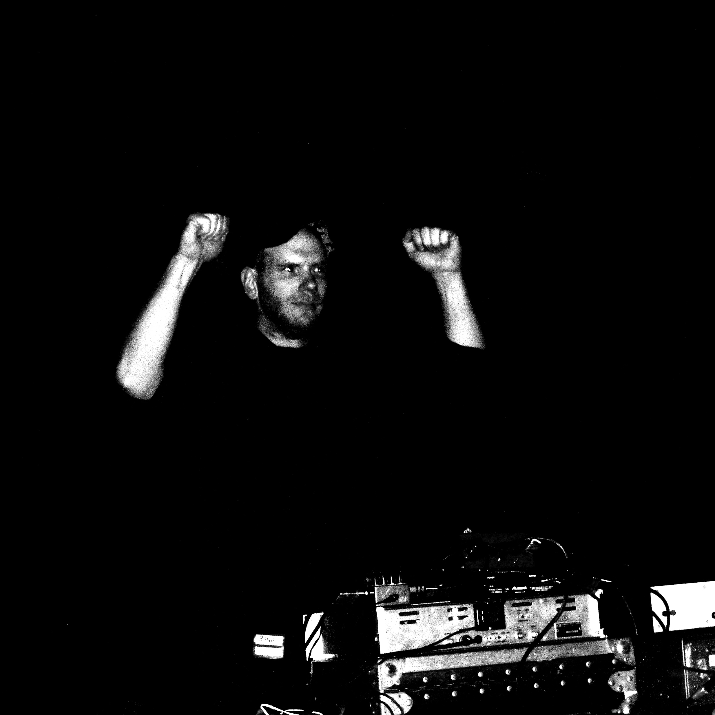 Kevin Drumm par Seth Tisue, 2009